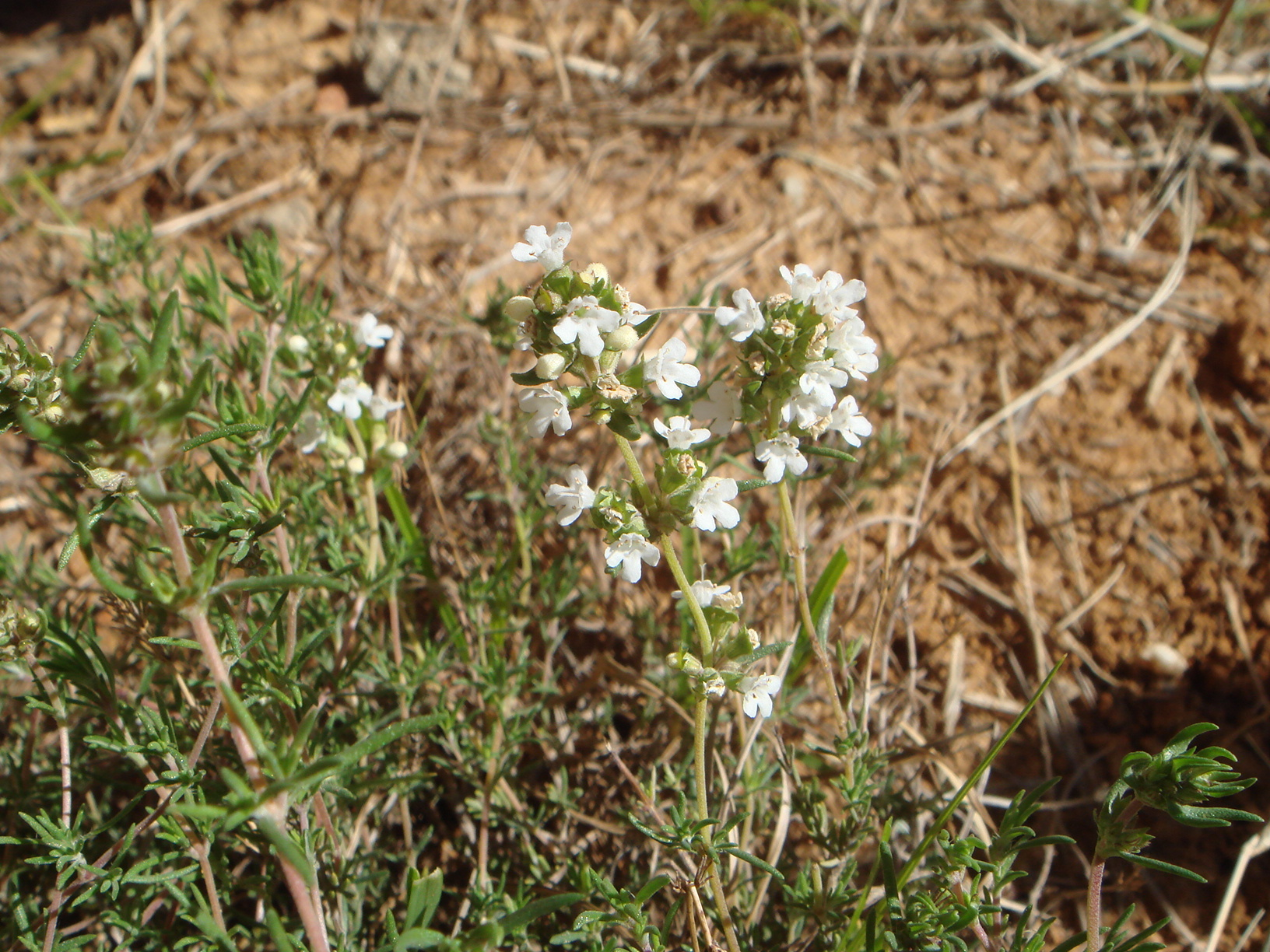 Thymus zygis La Torre, Ávila, España